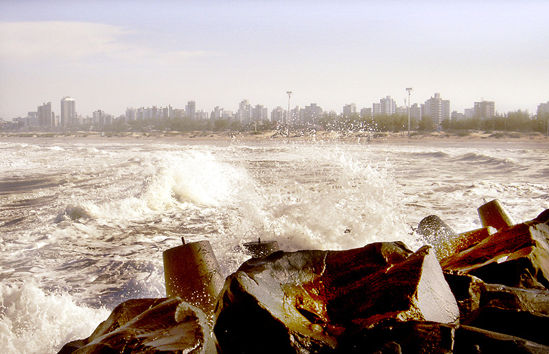 Praia Grande, em Torres, Rio Grande do Sul.